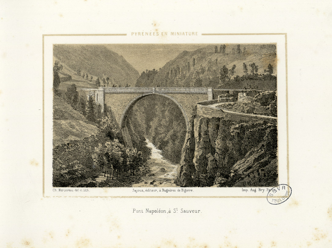 Impression chez Frick frères à Paris Album dépliant de 20 planches, toutes dessinées et lithographiées en camaïeu par Mercereau, exceptées les planches 2, 5, 11 et 18 qui on été dessinées par Fages, lithographiées par Palisse et aquarellées en couleurs Ancely, René (1876 - 1966). Possesseur